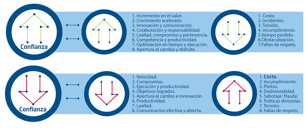 Resultados de el aumento o disminución de la confianza en un equipo de trabajo, desarrollado por Stephen M. R. Covey, fundador de Speed of Trust, traducido por Meliton Cross, Experto en Desarrollo Organizacional y fundador de Coscatl DO.